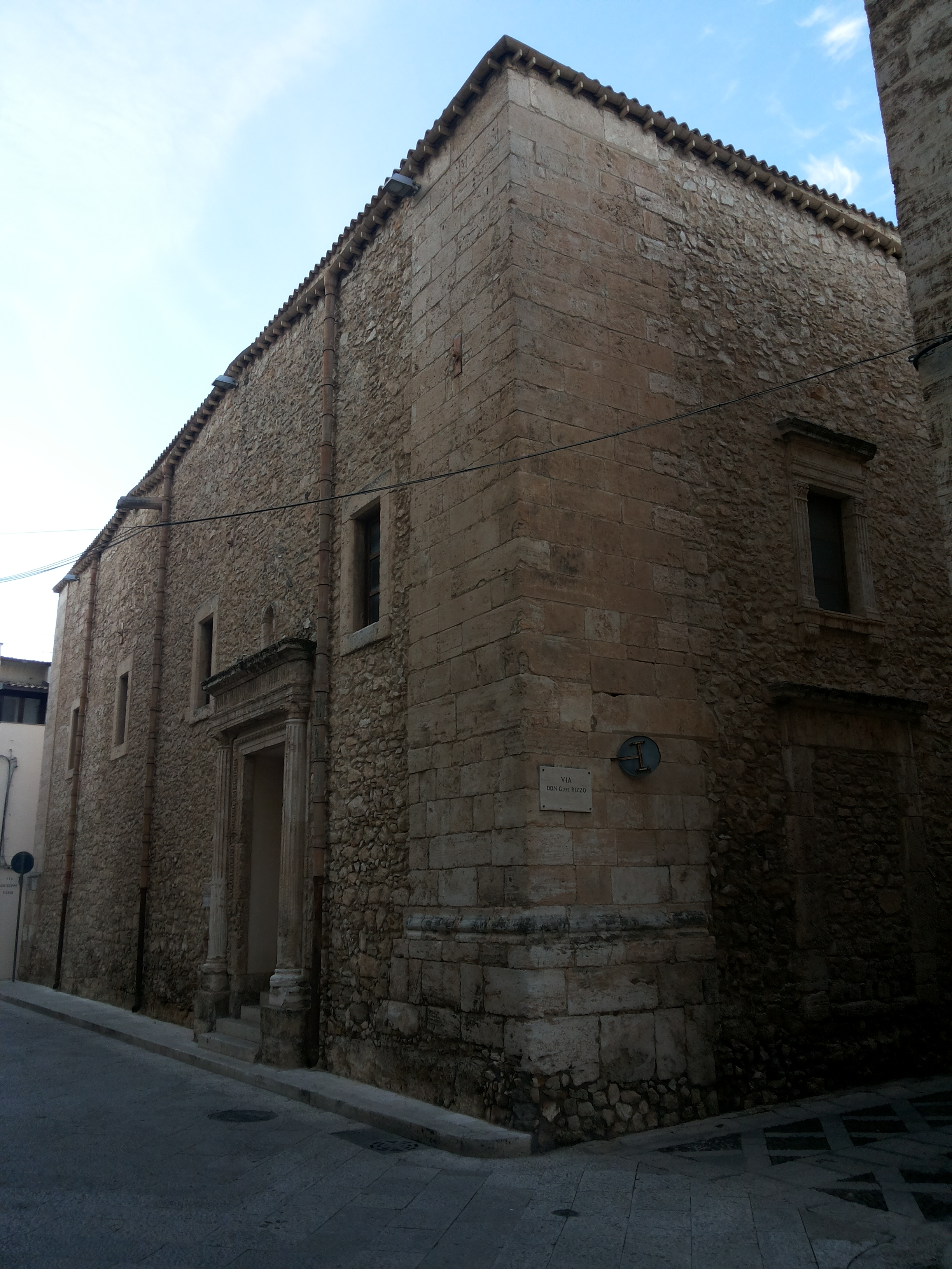 Chiesa di San Giacomo de Spada (Alcamo)